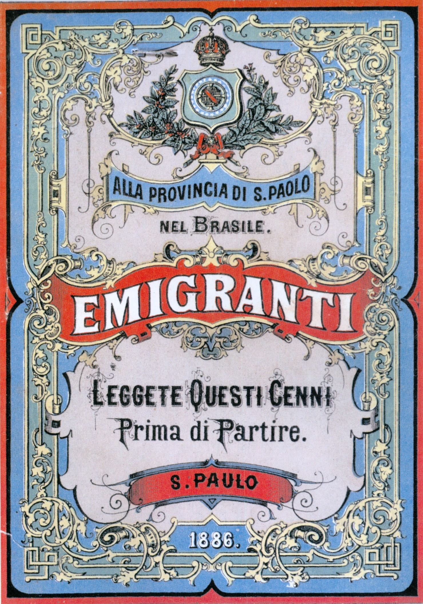 "ALLA PROVINCIA DI S. PAOLO NEL BRASILE EMIGRANTI LEGGETE QUESTI CENNI PRIMA DI PARTIRE. 1886"